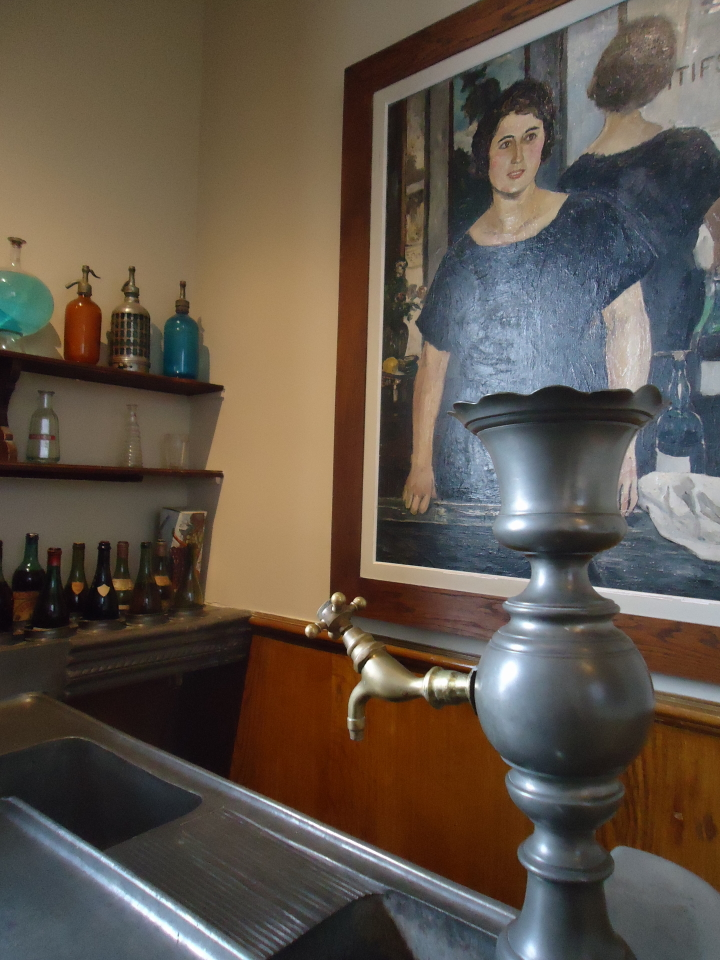 Salle du bar Marcel Leprin, La belle Cabaretiere, 1924, huile sur toile, collection musee de Montmartre